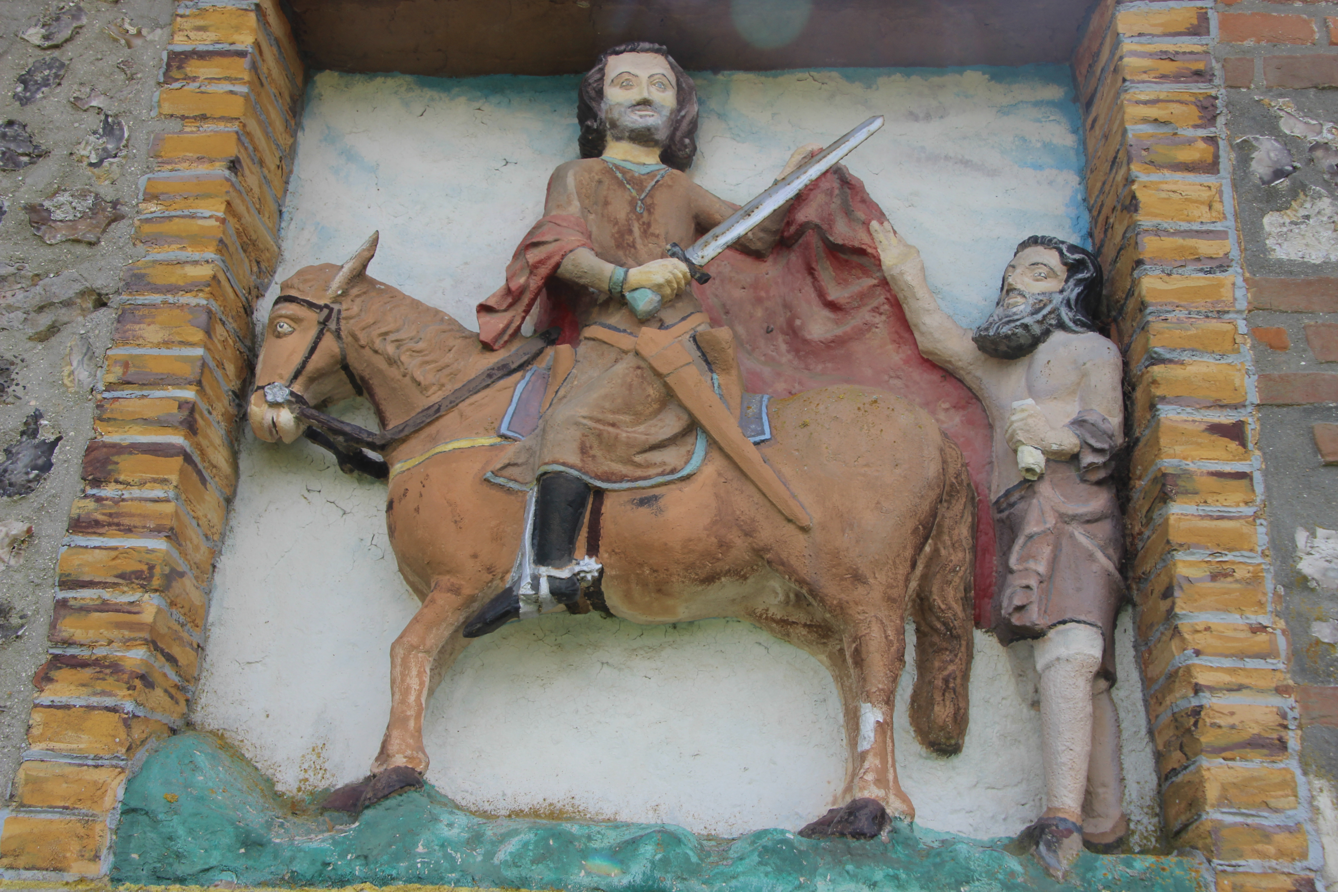 Pierreval